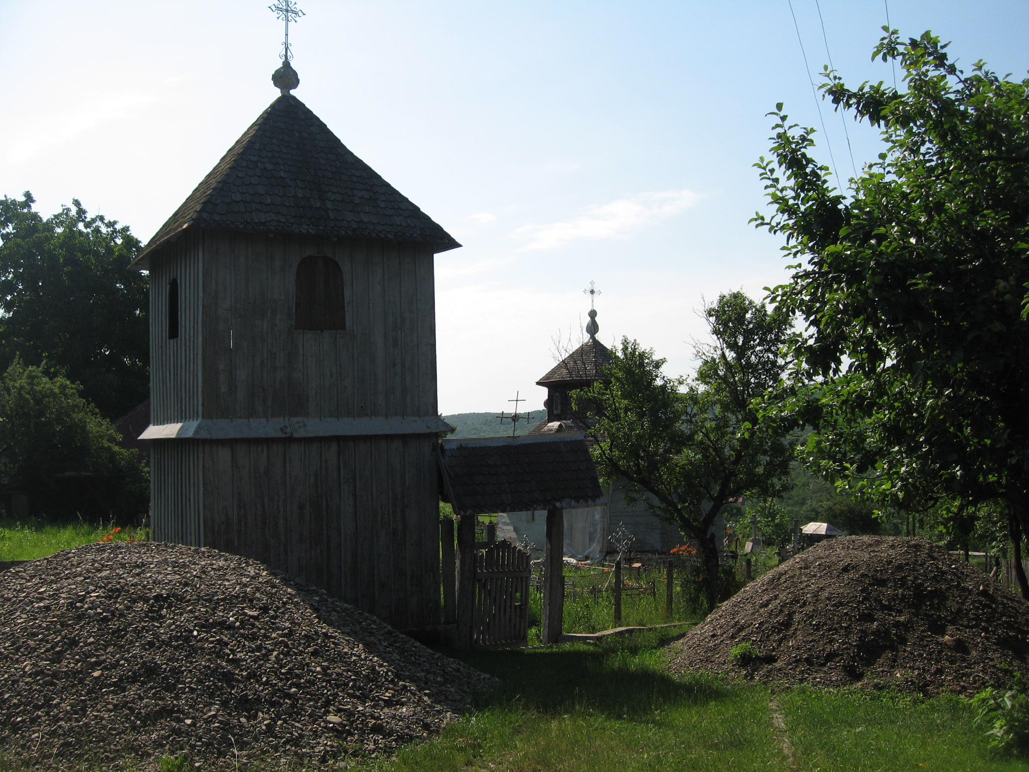 Mănăstirea Agafton 06